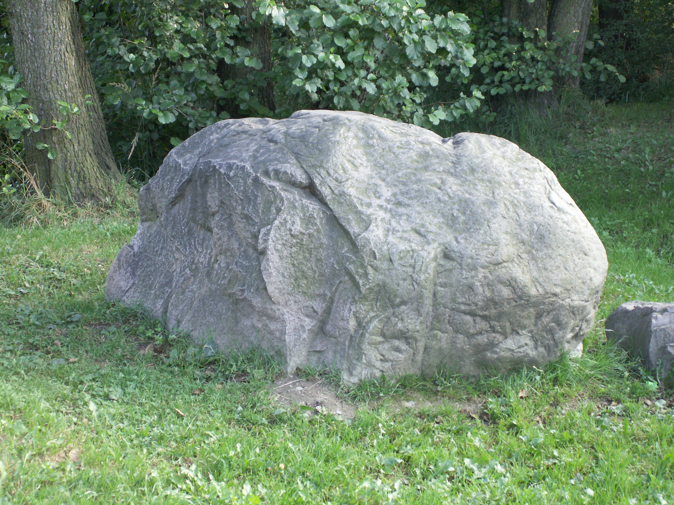 bludný balvan u Liptaně, původ pravděpodobně jižní Švédsko, transportován v době sálského zalednění, rozměry 220x130x120 cm, váha 4,7 tuny